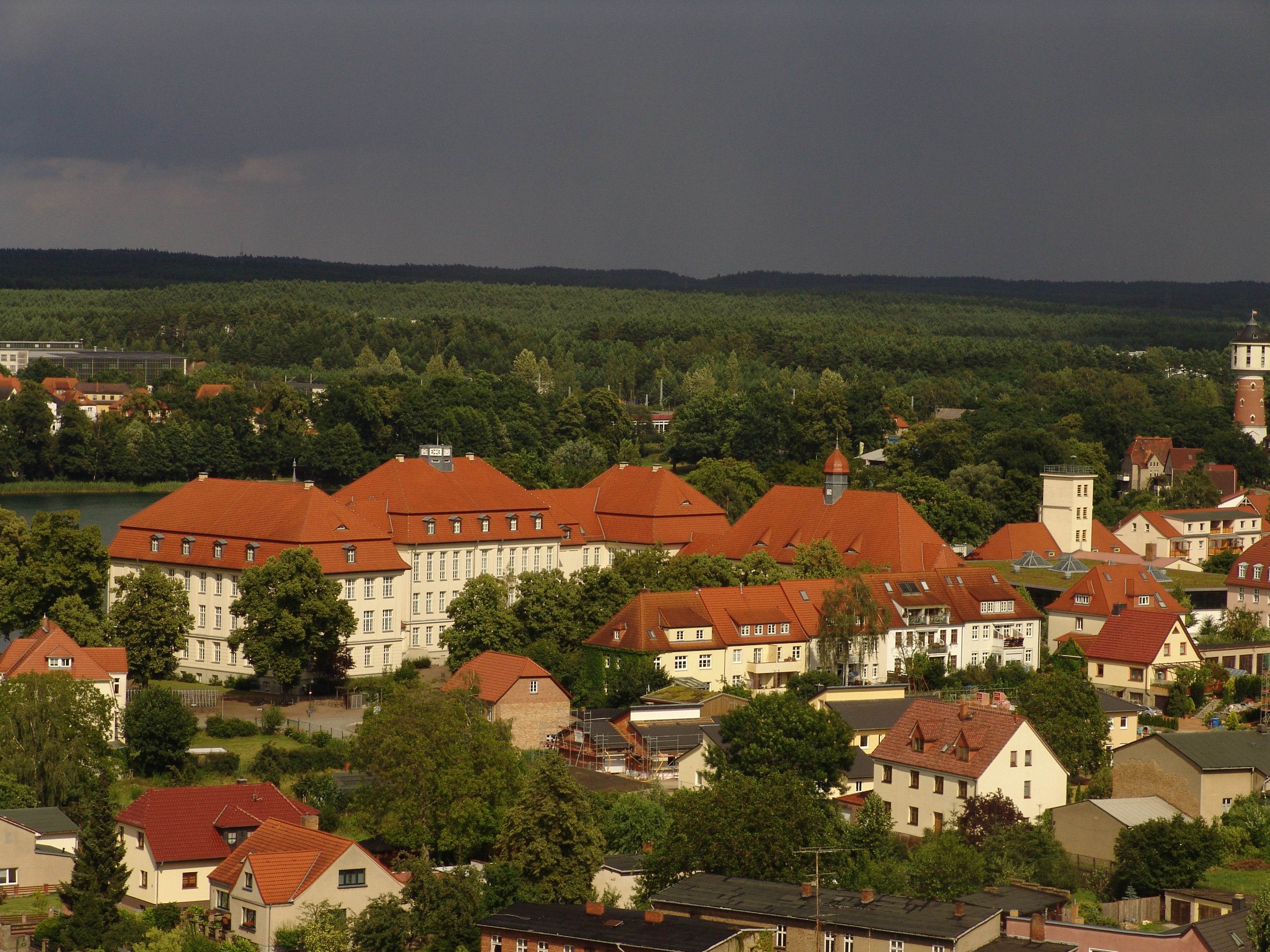 historische Gebäude in Neustrelitz